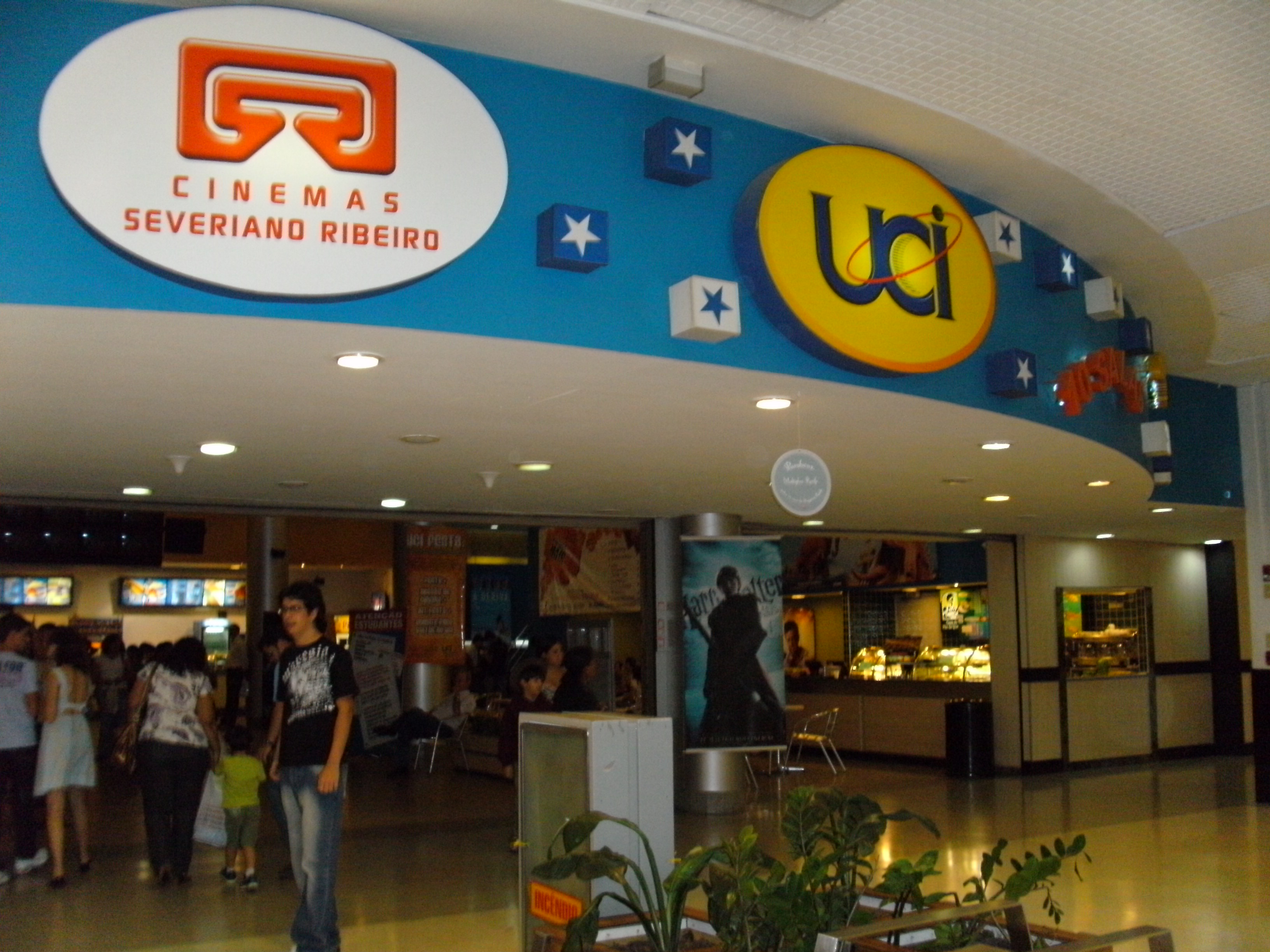 UCI Ribeiro